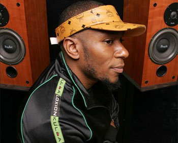 mos def 2004